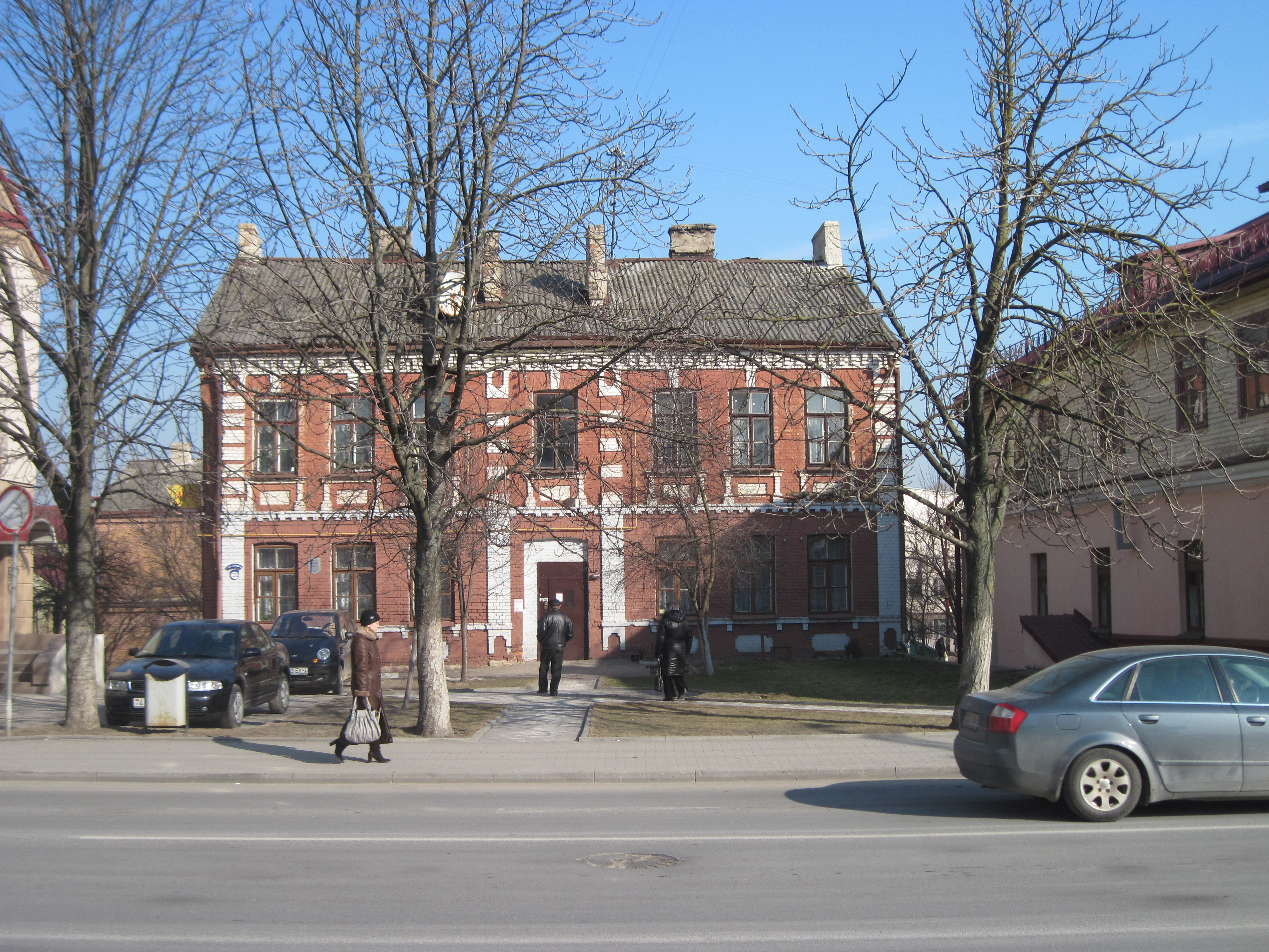 Беларуская (тарашкевіца): Забудова гістарычнага цэнтра Гродна. Вуліца К. Маркса, 38А